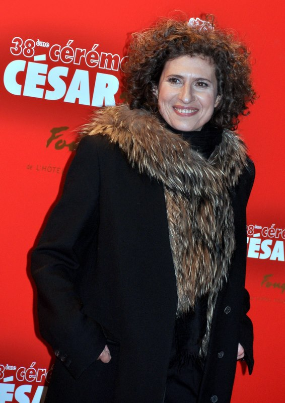 Guilaine Londez à la cérémonie des César